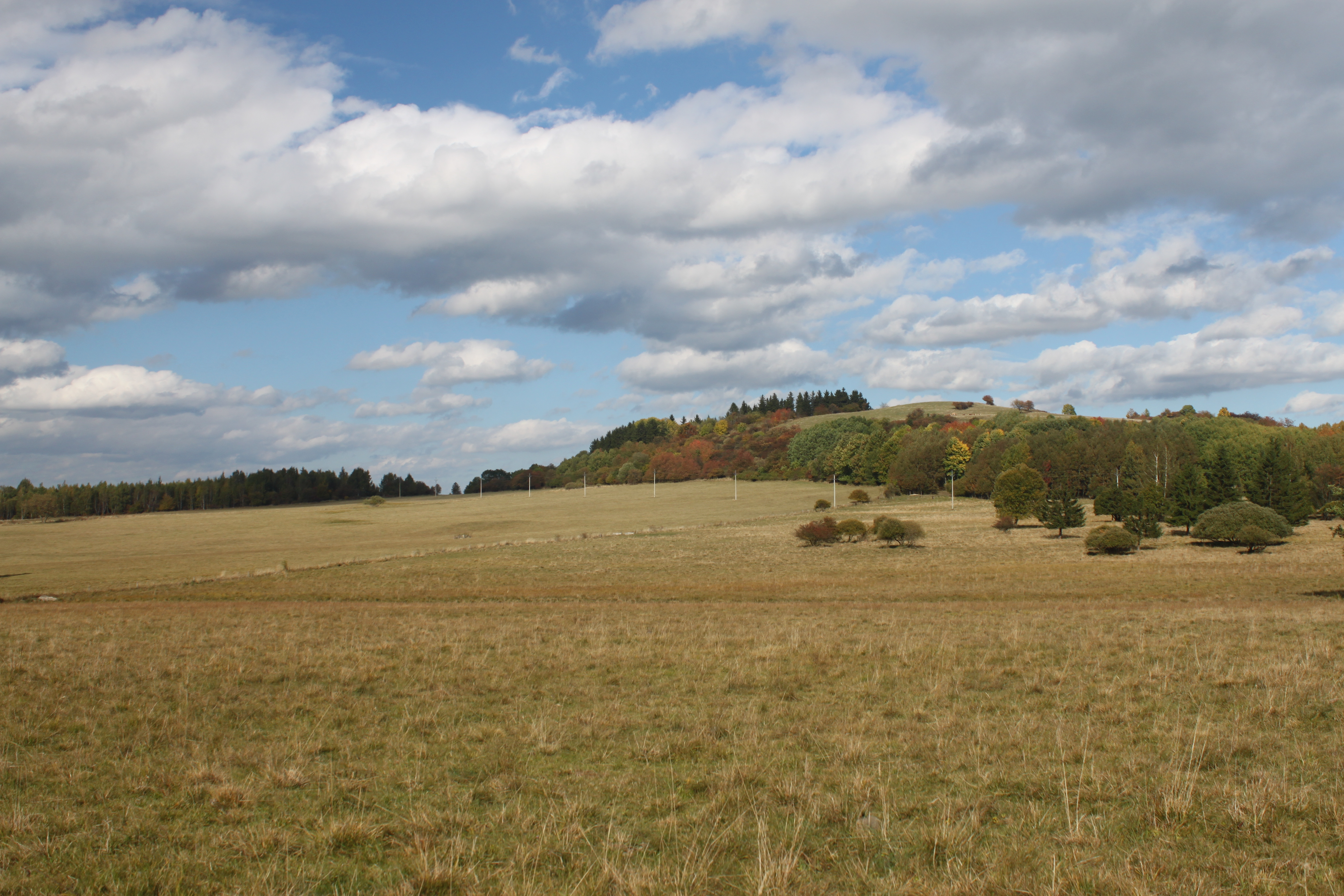 PP Kounické louky